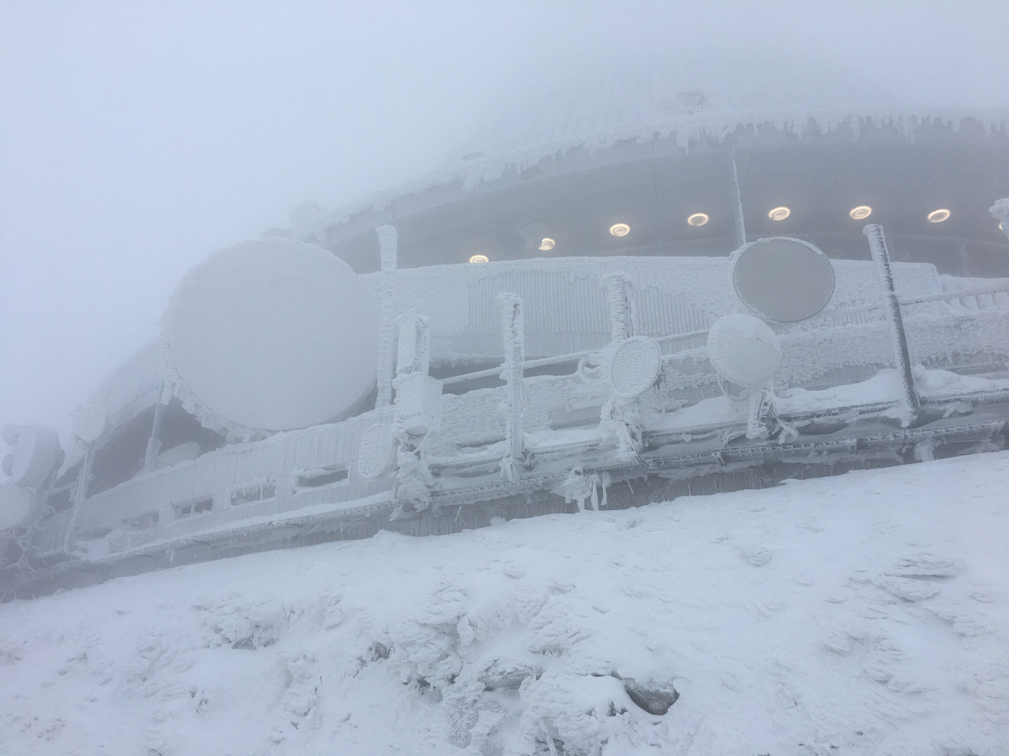 foto: Rafal Bajena - Szpica JESTED - zima